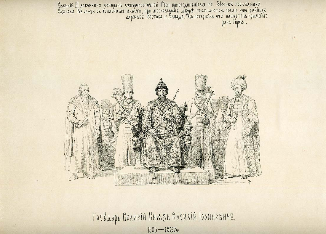 Государь Великий Князь Василий Иоаннович. 1505-1533 г. Василий III закончил собирание северовосточной Руси присоединением к Москве оследних уделов. В связи с усилением власти, при московском дворе появляются послы иностранных держав Востока и Запада. Русь потерпела от нашествия крымского хана Гирея.